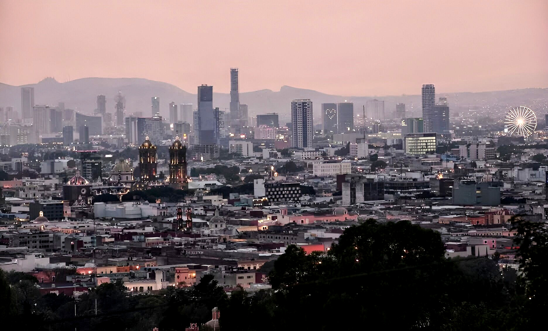 Paisaje urbano de la ciudad de Puebla con Catedral de Puebla al centro.